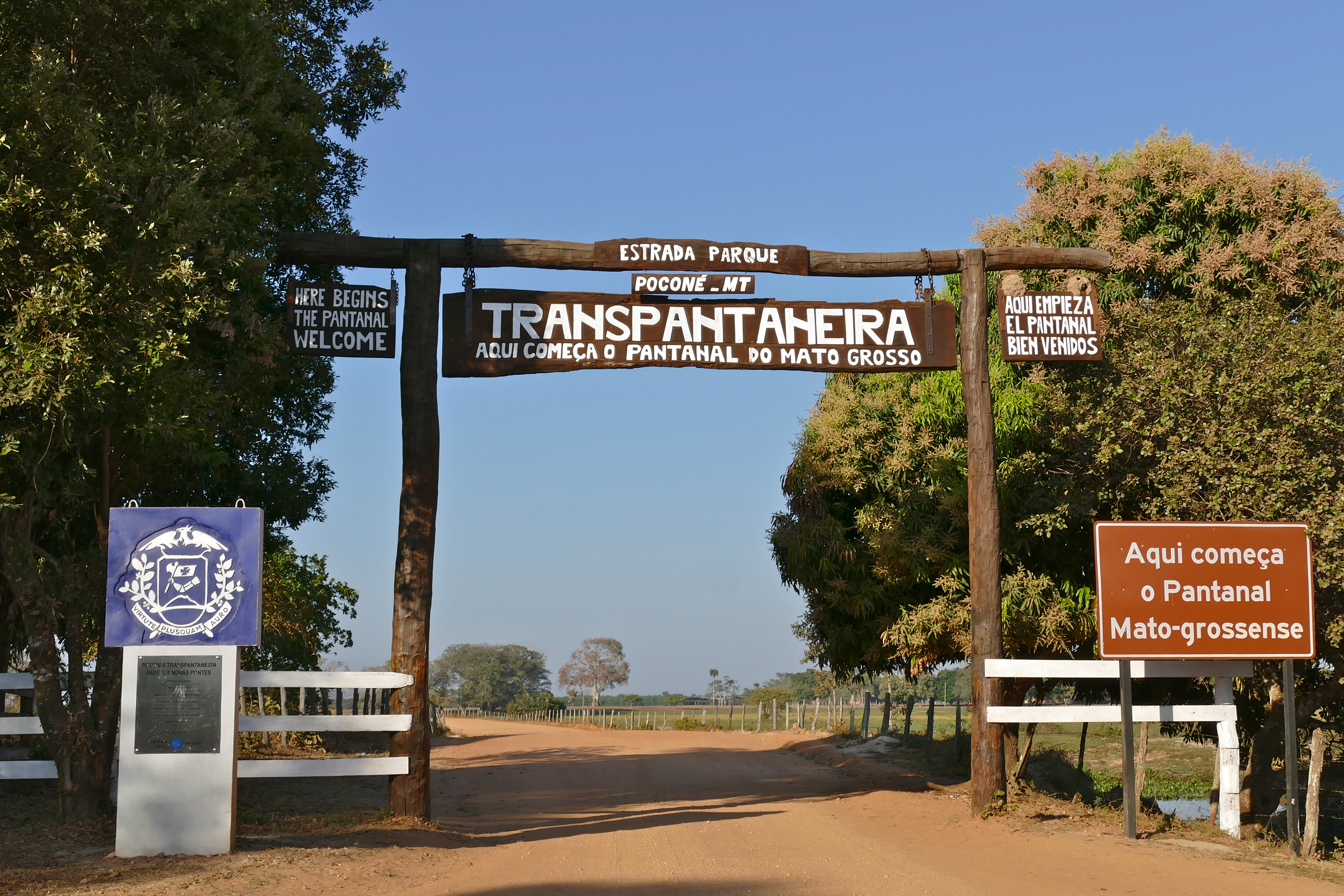 Transpantaneira, Poconé, Mato Grosso, BRAZIL